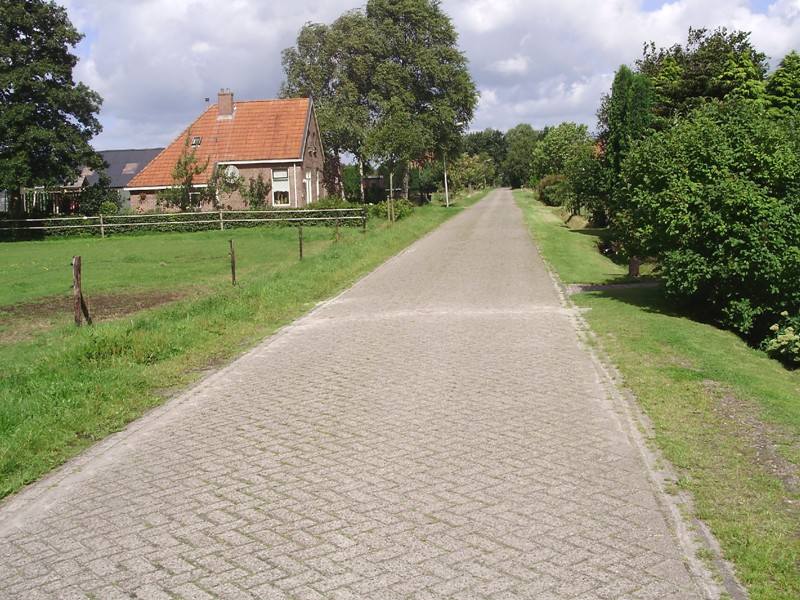 Buurtschap Rode Dorp in Weststellingwerf (Friesland)